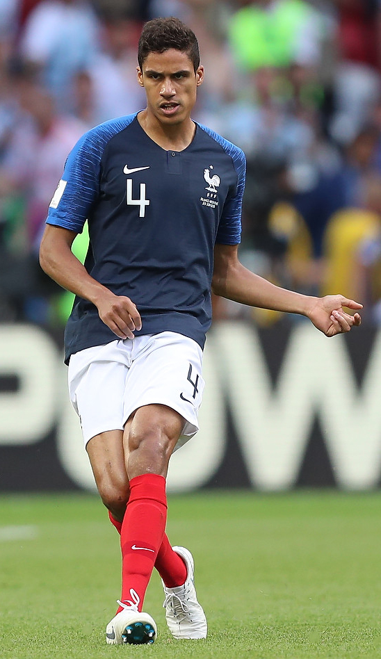 Сборная Франции оставила Месси и Аргентину за бортом чемпионата мира 2018